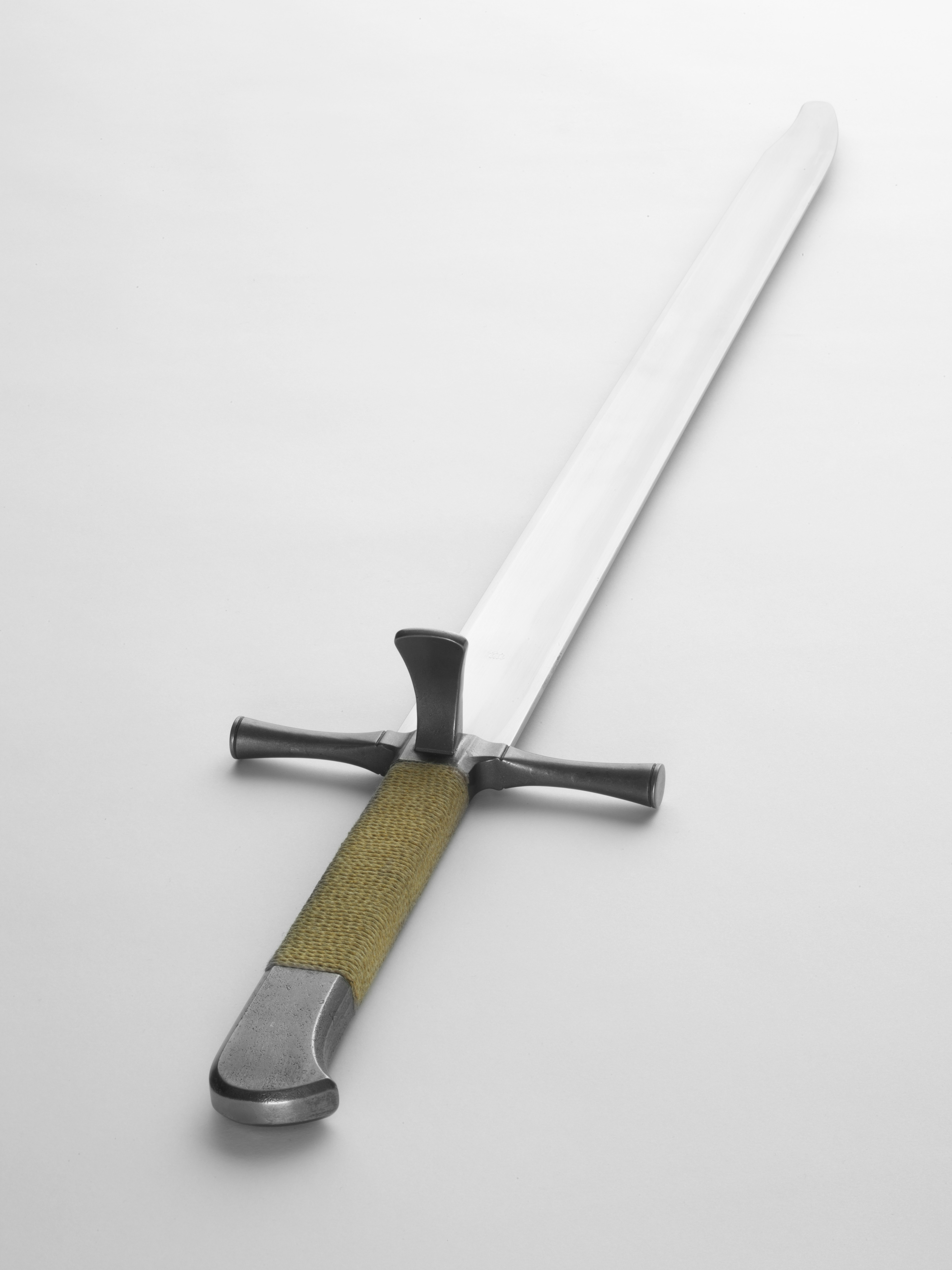 Maestro Line Marxbruder.